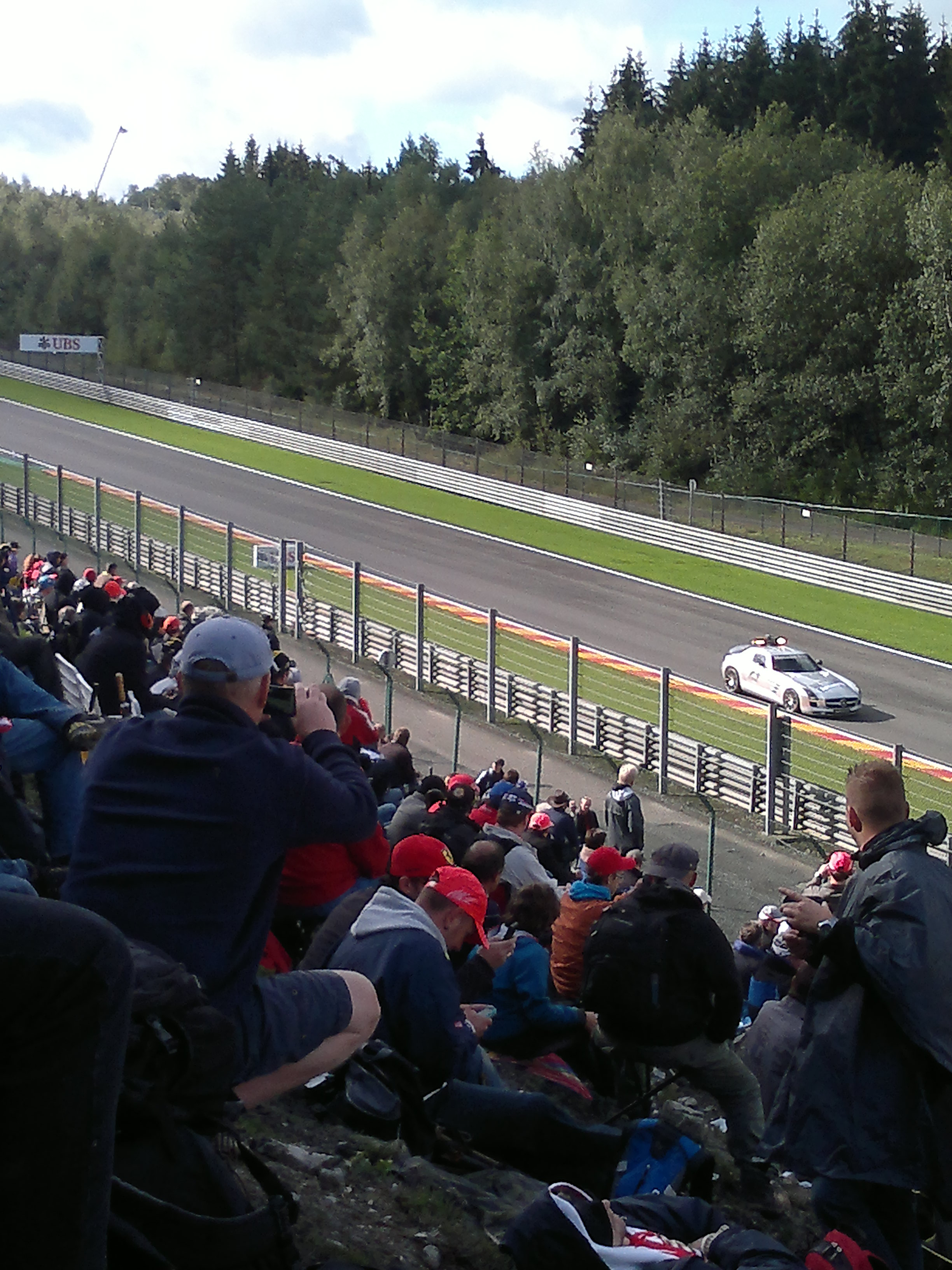 Grand Prix de Belgique Spa Francorchamp